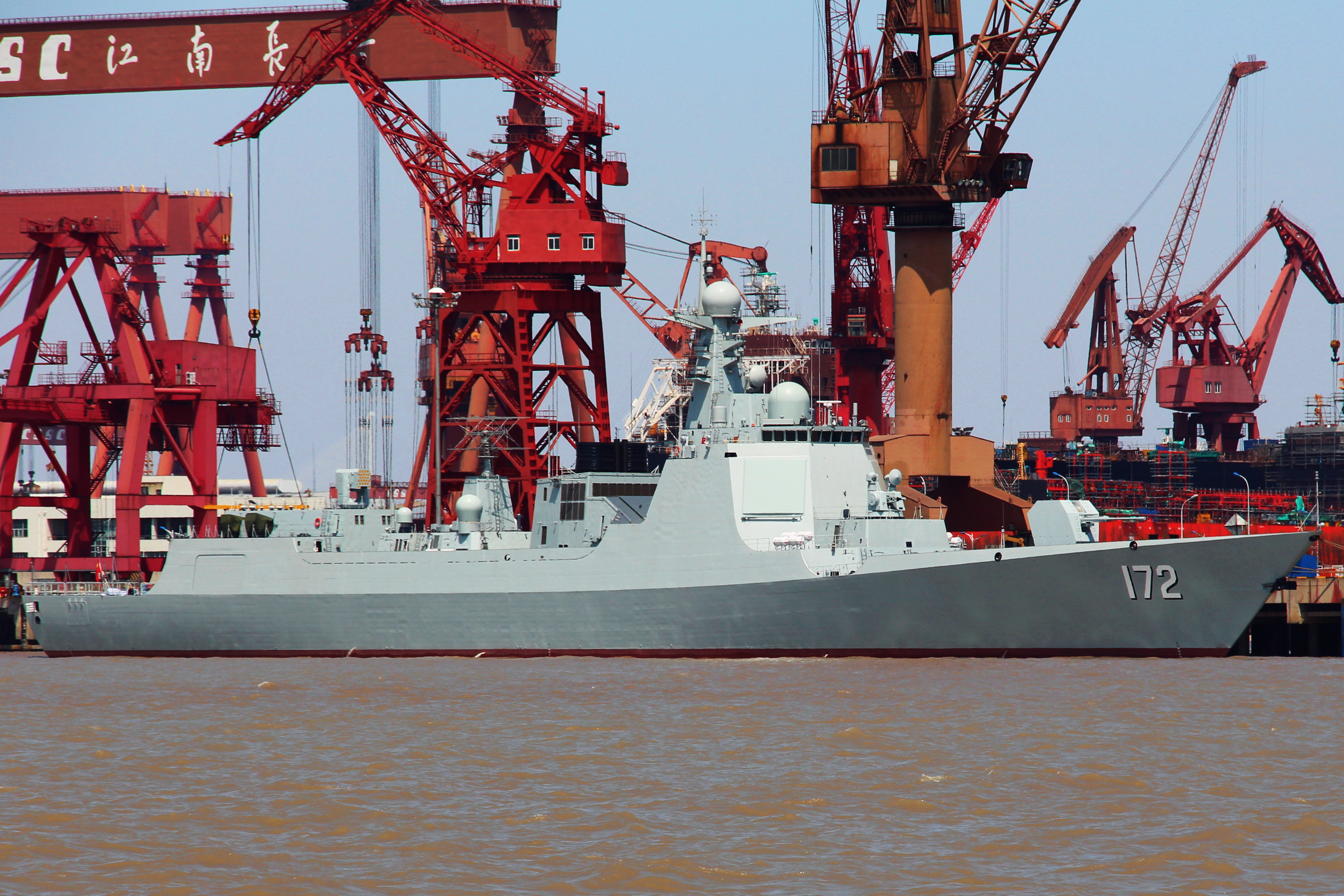 停靠在长兴岛港口的“昆明”号导弹驱逐舰。